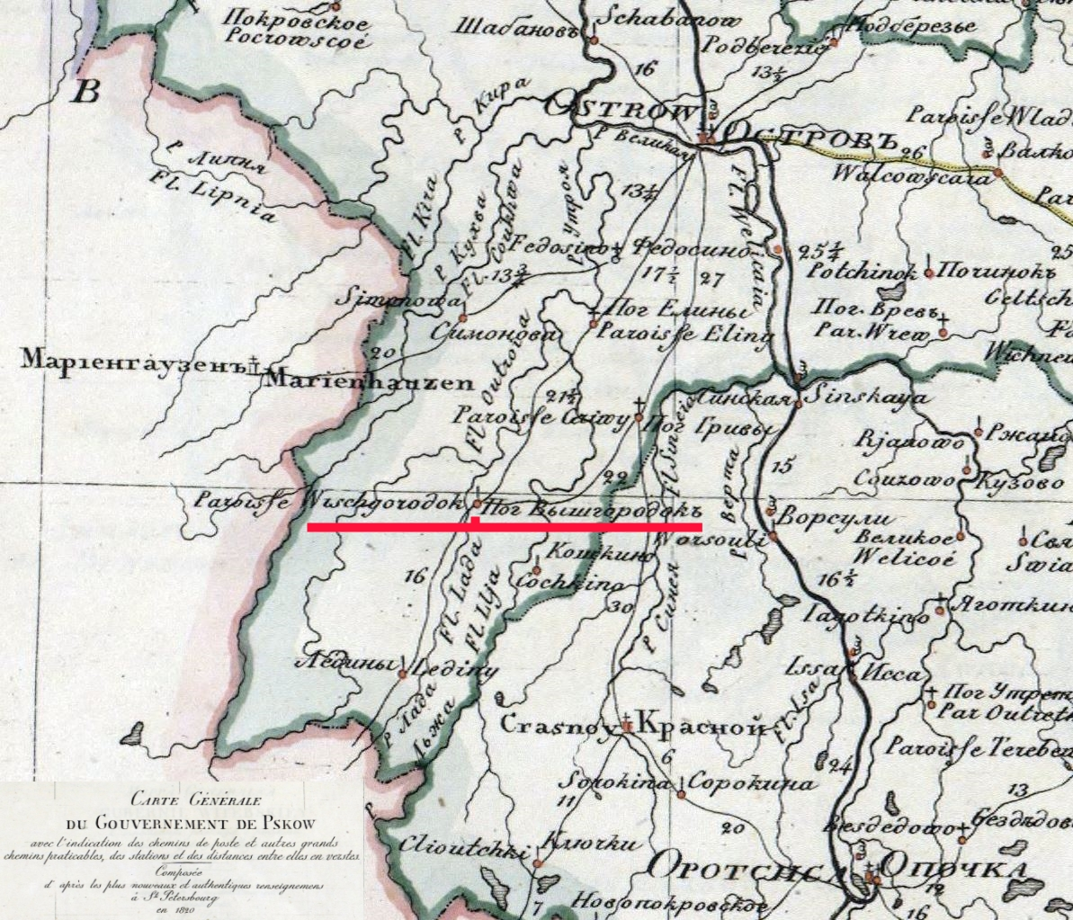 Vyshgorodok on the Pskov Governorate map of 1820